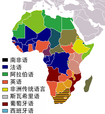 非洲国家官方语言。